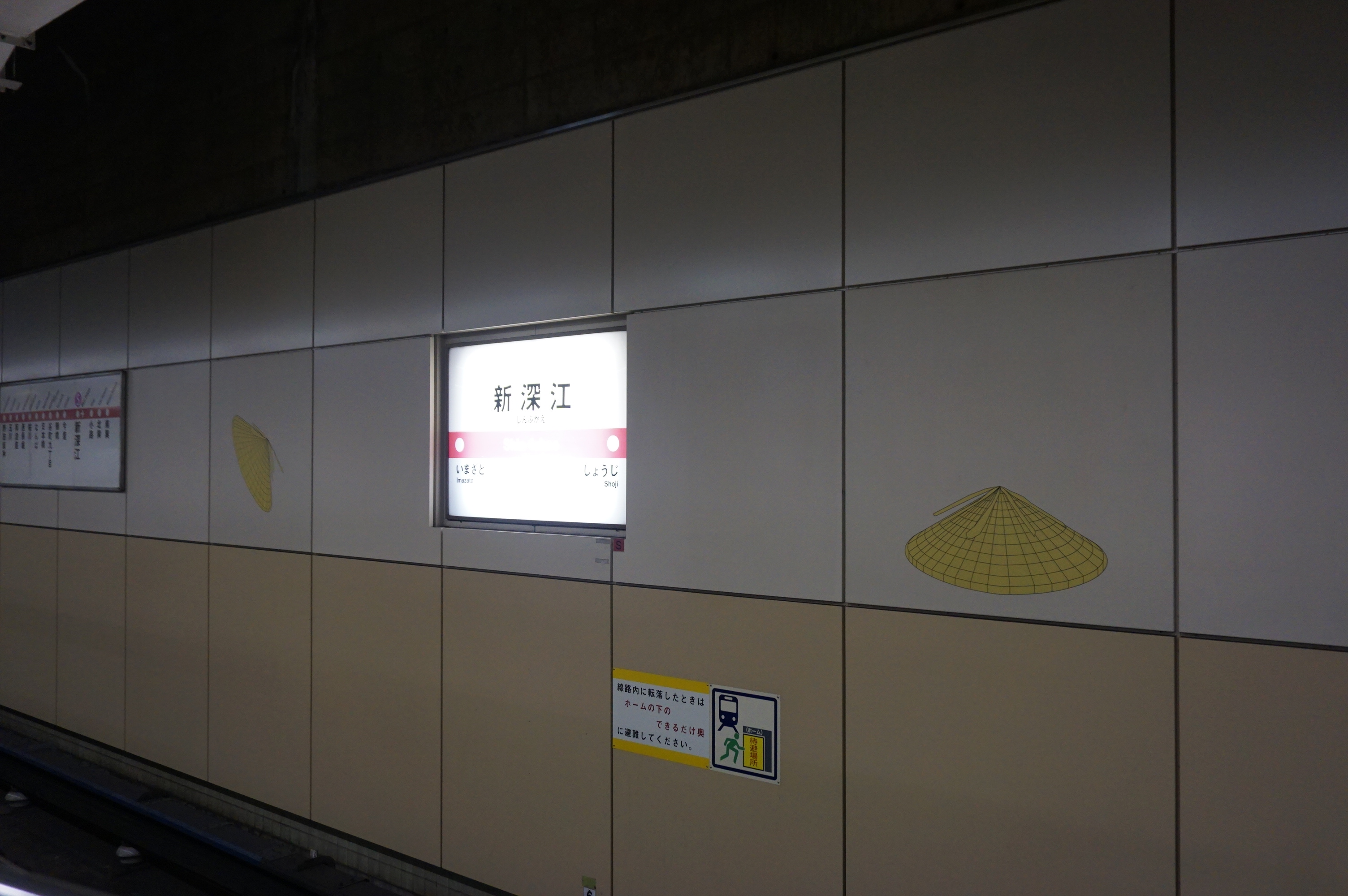 2019年12月1日撮影